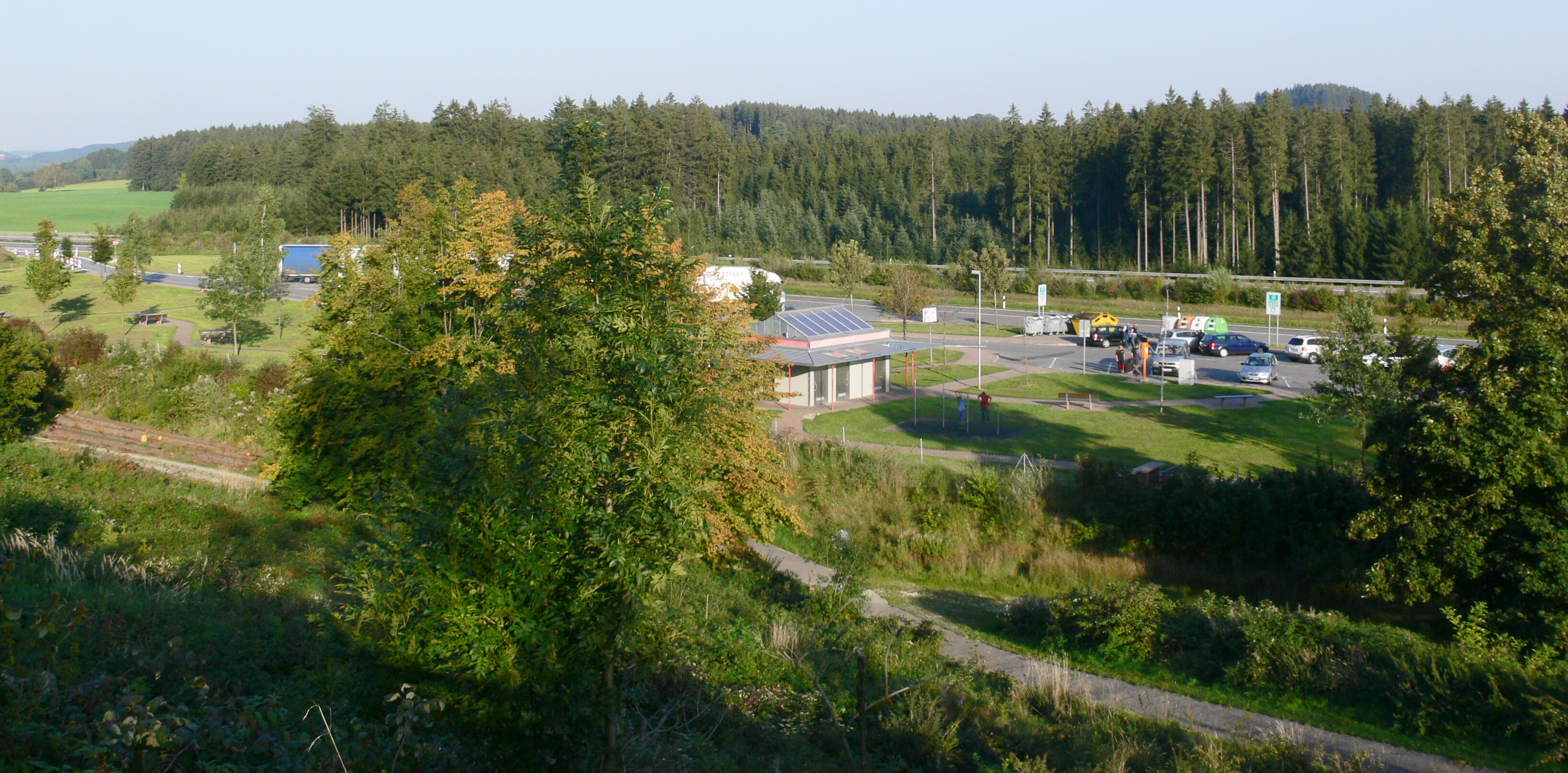 Rastplatz an der A 96 nahe der Autobahnkapelle St. Gallus (Leutkirch), gesehen vom Aufstieg vom Rastplatz zur Kapelle